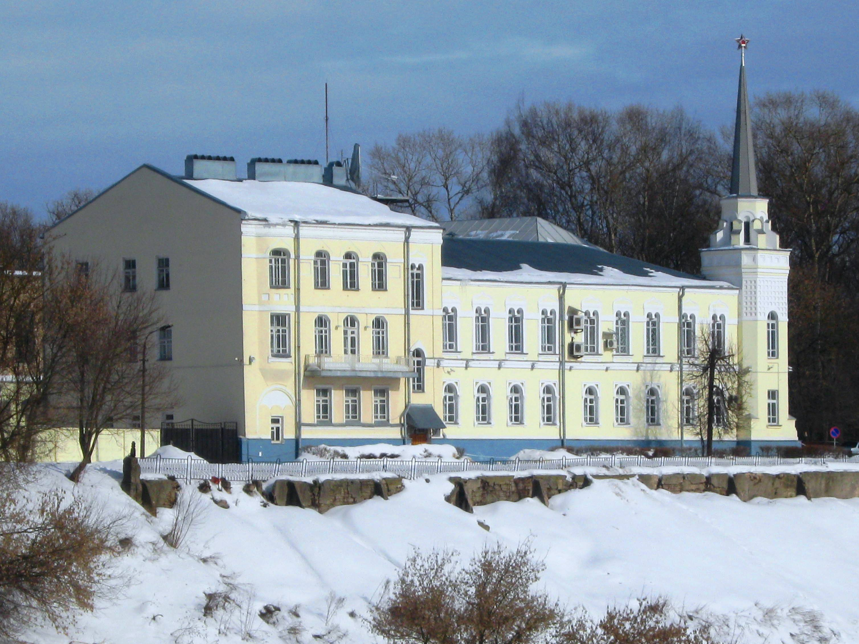 РКЦ (Ржев)